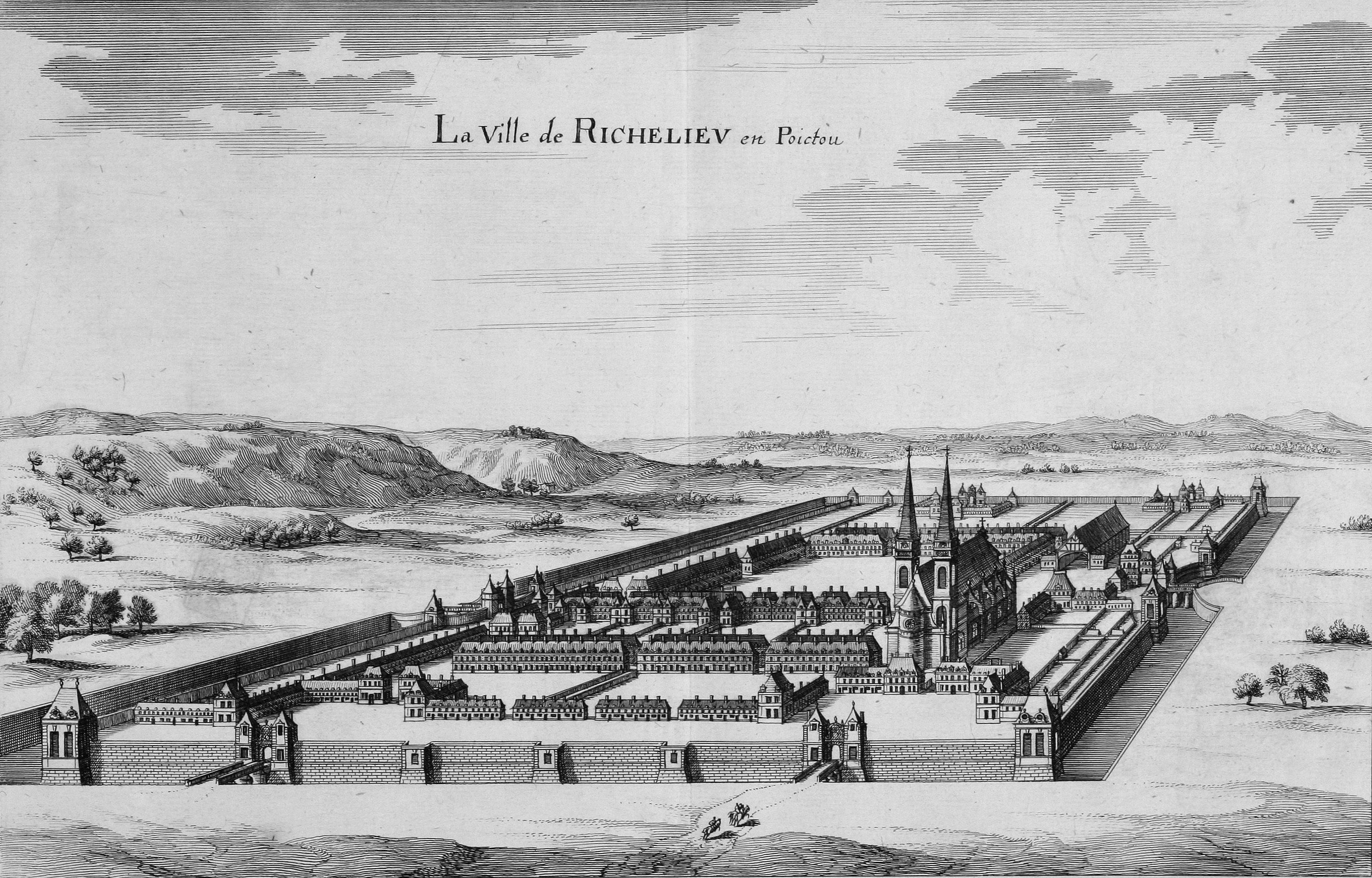 Kupferstich mit einer Ansicht der Stadt Richelieu, Indre-et-Loire, Frankreich, aus der Topographia Galliae